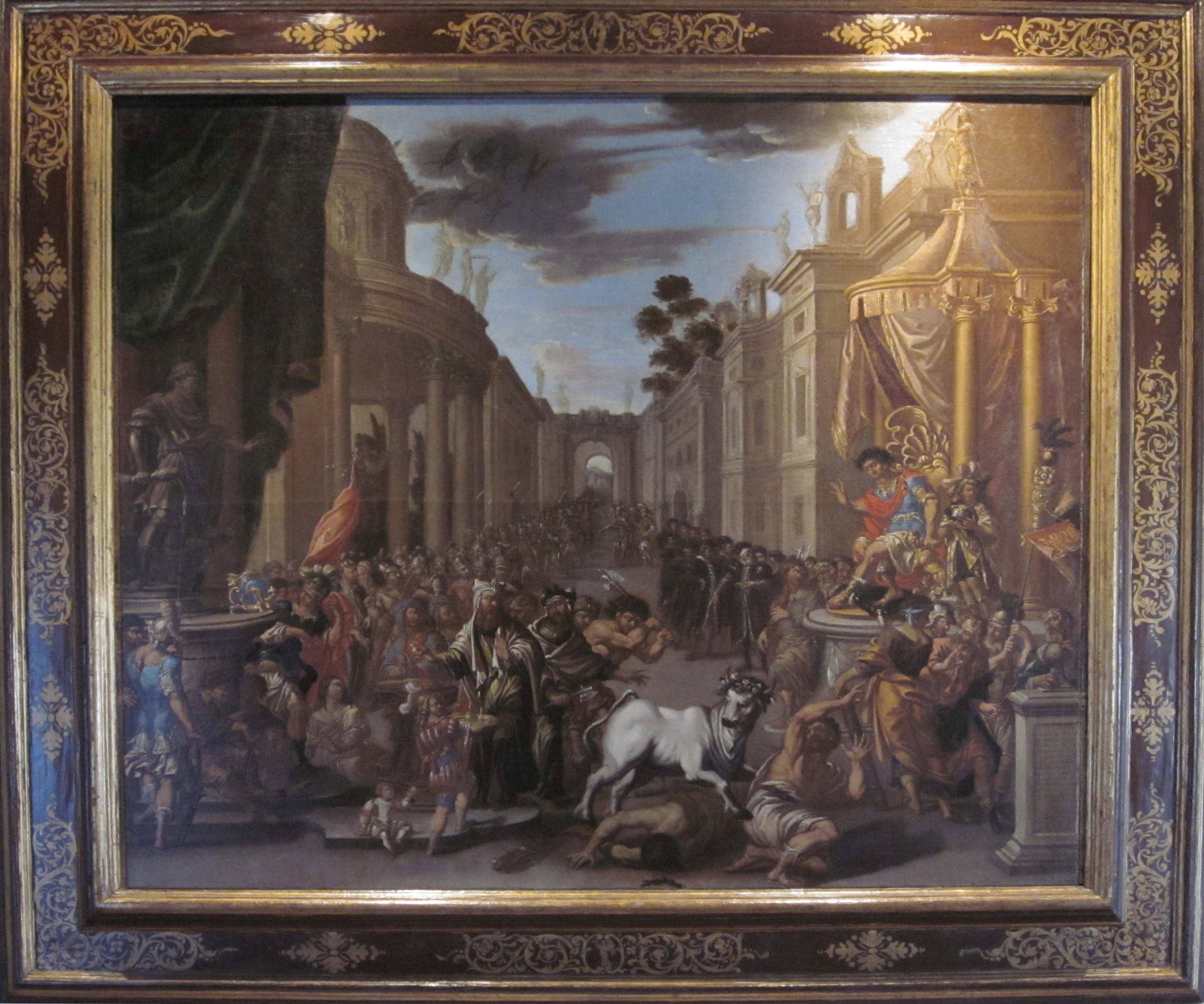 dipinto di Francesco Providoni del XVII secolo, conservato nel Museo di Bevagna